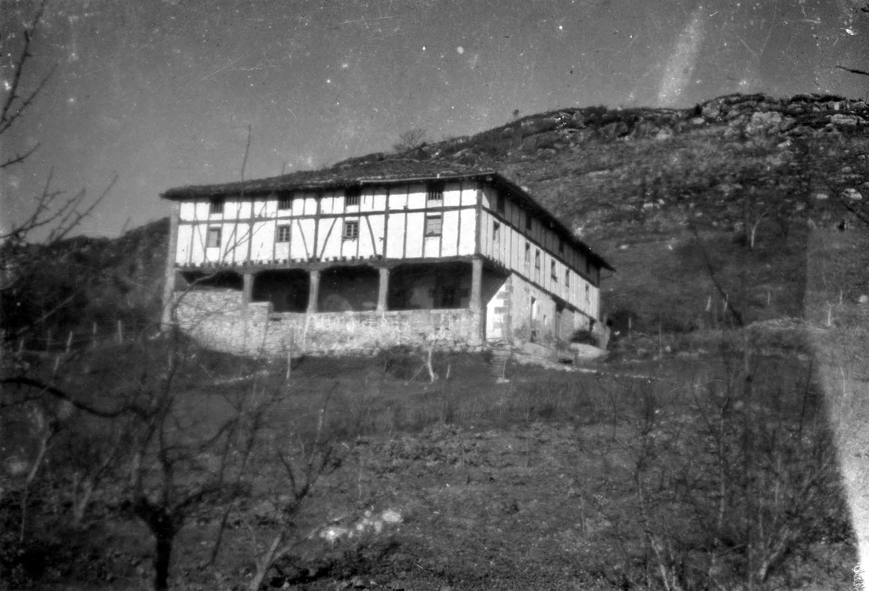 Usurbilgo Arrillaga Haundi baserria